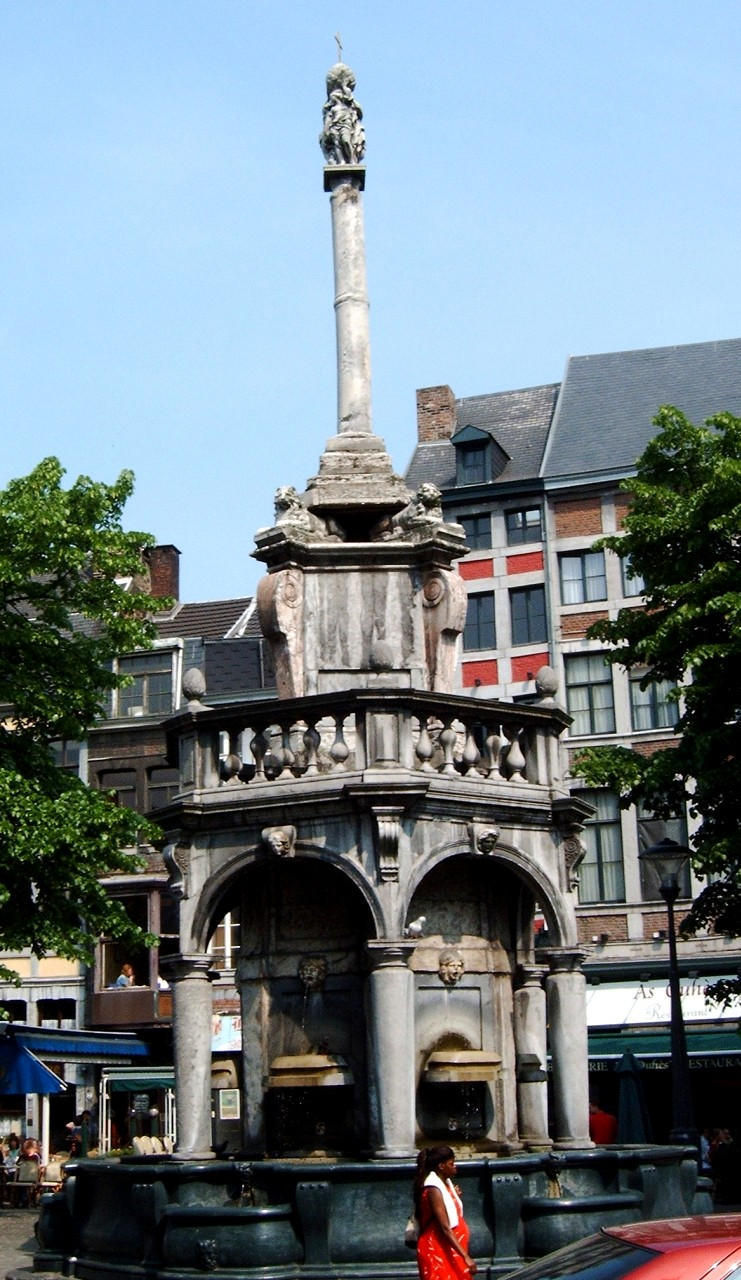 Brunnen der Drei Grazien auf dem Marktplatz in Lüttich.